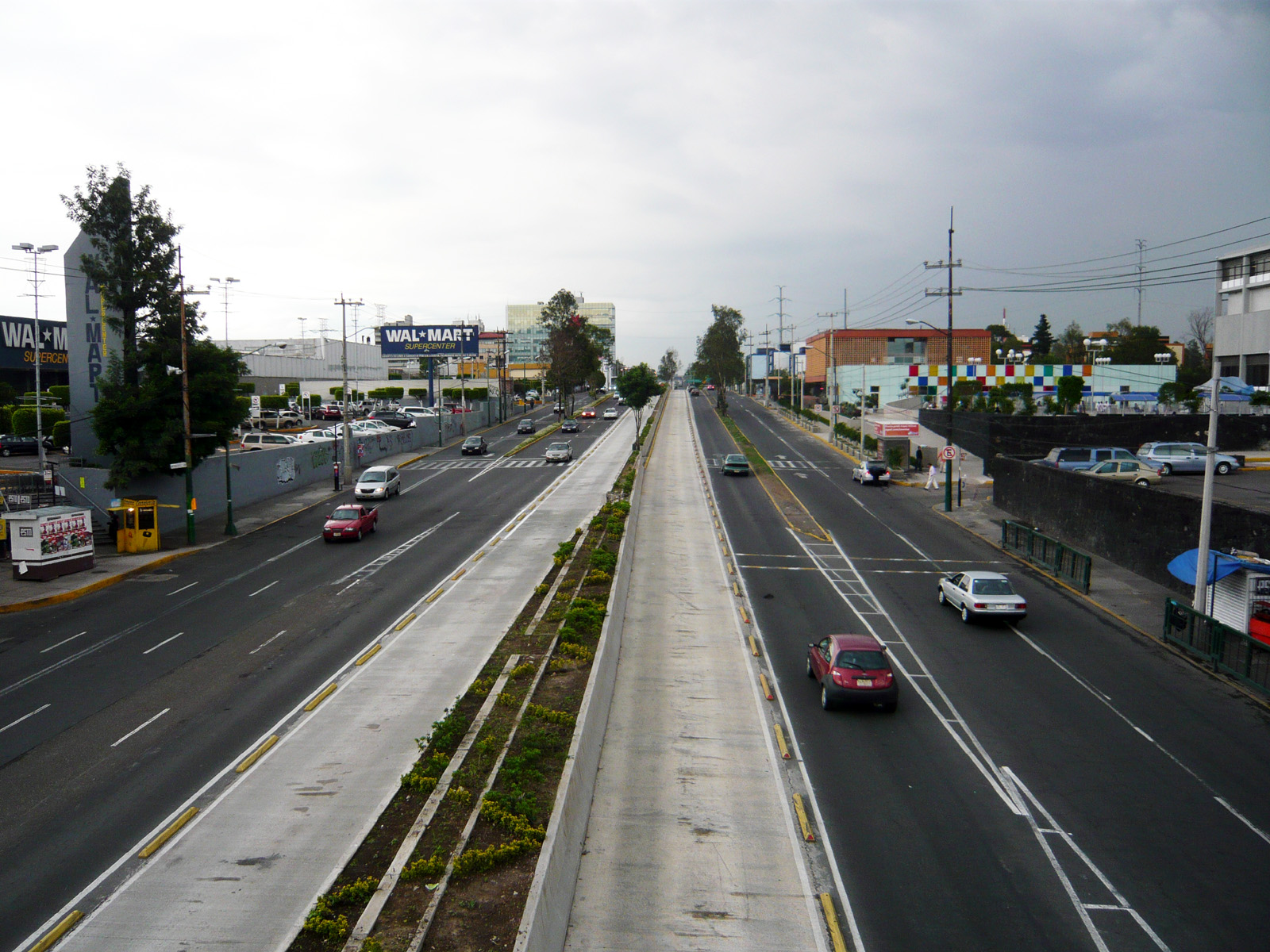 Avenida de los Insurgentes Sur ved Perisur, Mexico by